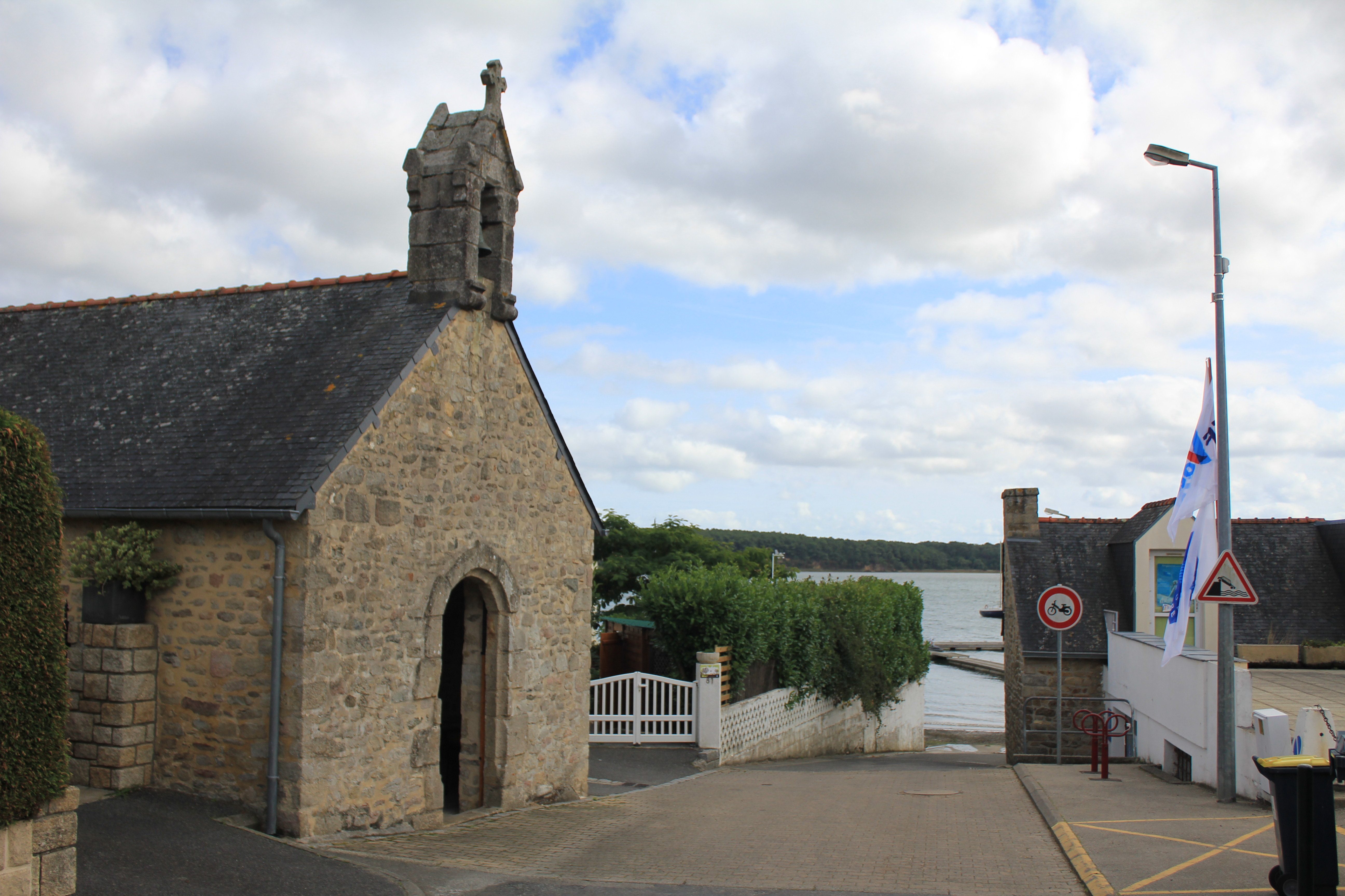 Chapelle Saint-Guénaël de Lanester